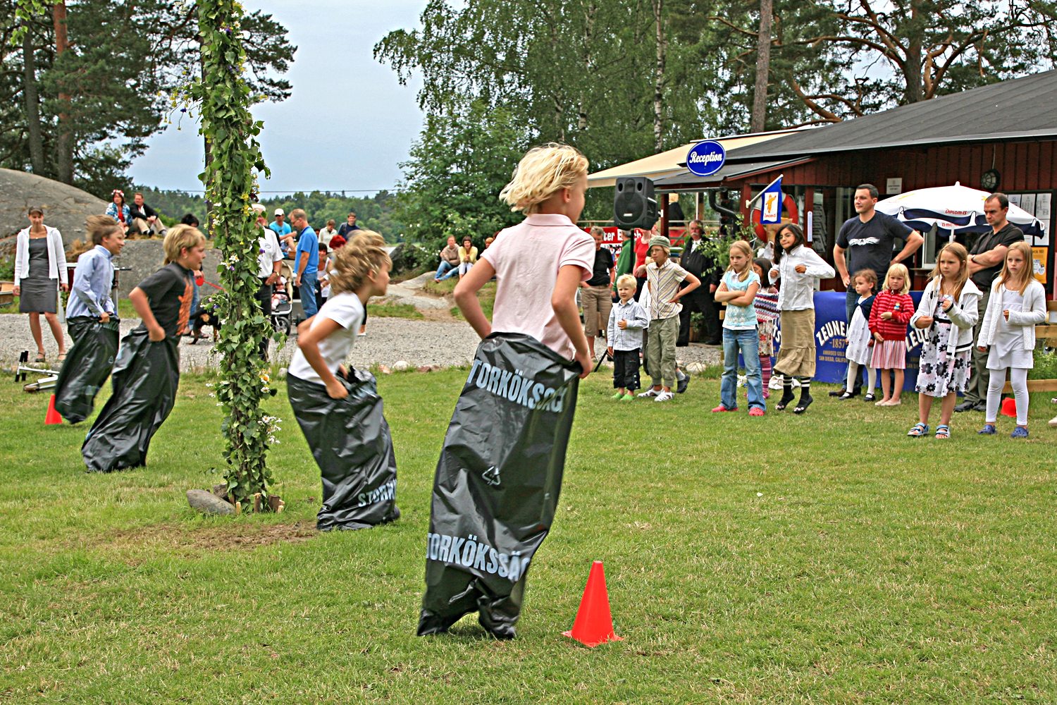 IMG_6506-1500